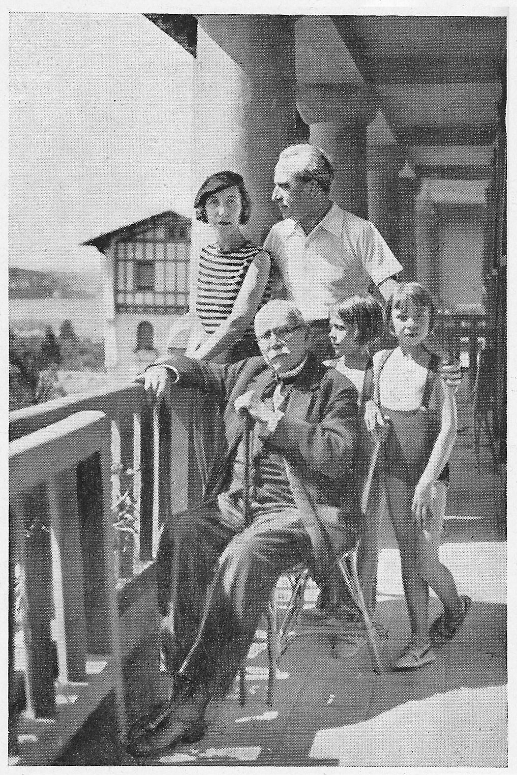 Édouard Branly ; avec sa fille Élisabeth , son gendre Paul Tournon & ses deux petites-filles Marion et Florence.